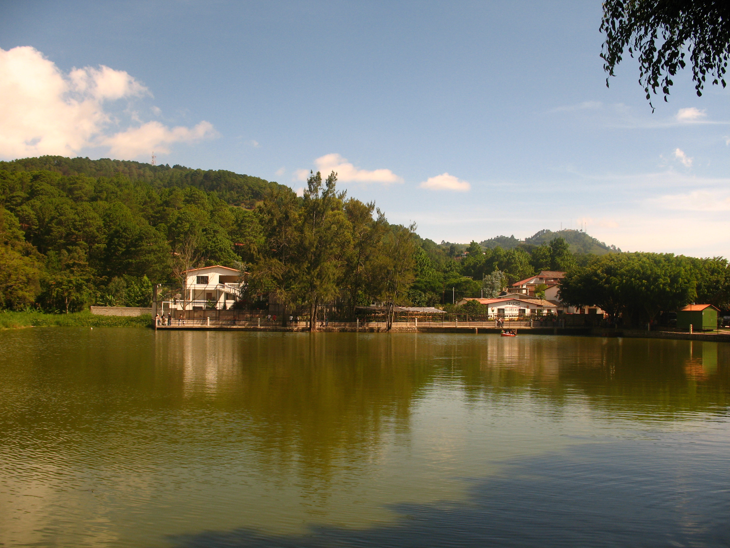 Fotografia del pequeño lago en Santa Lucia Francisco Morazan. Honduras. Tomada por Aracely Garcia.